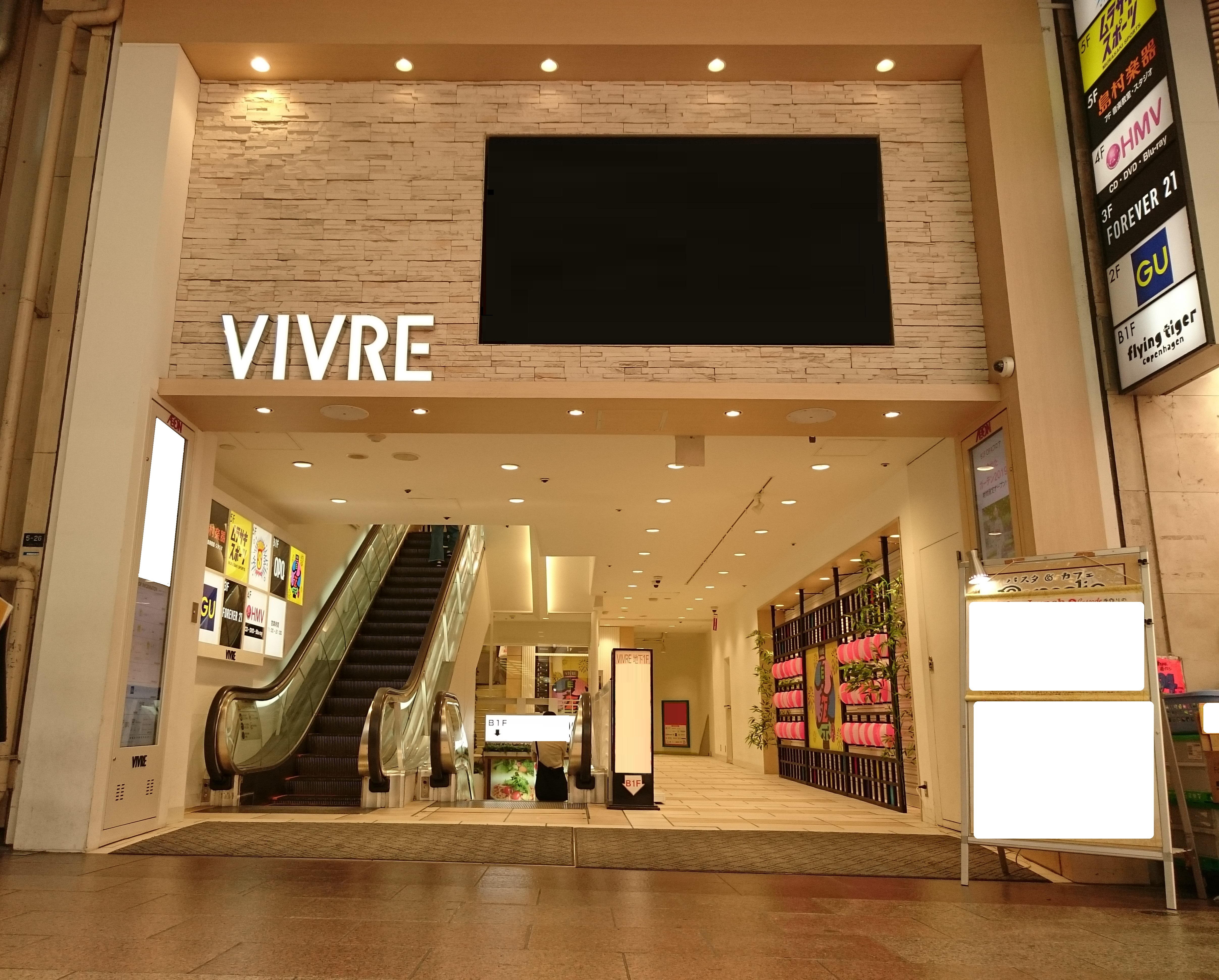 三宮ビブレ（リニューアル後）の入口 Sony Xperia Z3